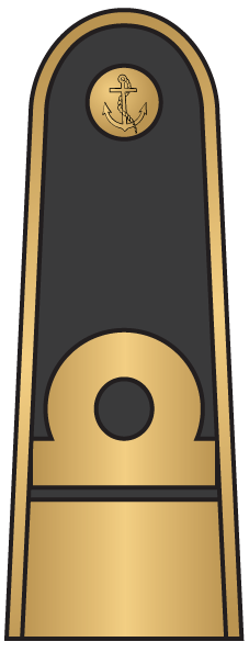 Flotilės admirolas.